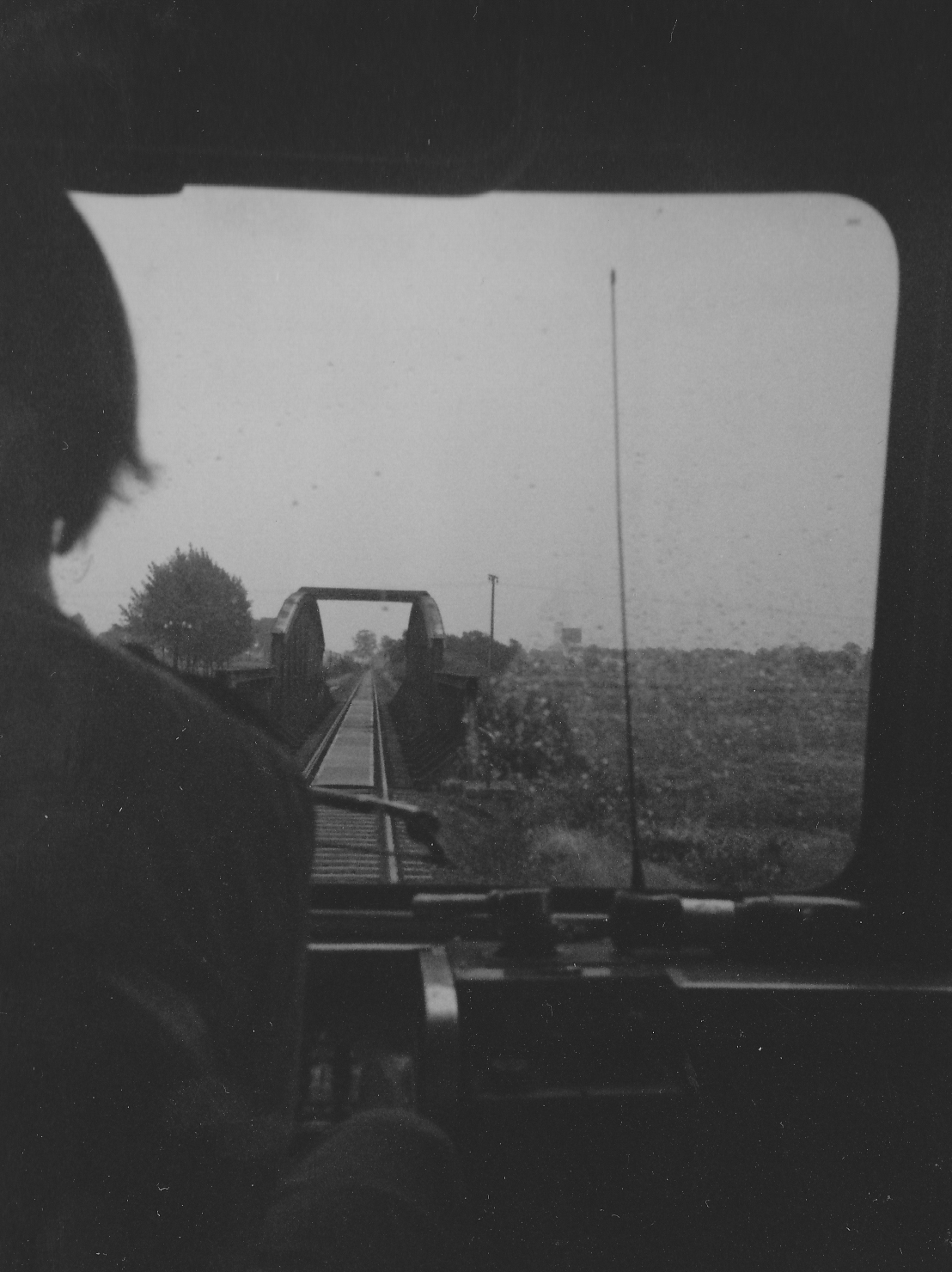 Überquerung der Aller auf der Bahnstrecke Celle-Gifhorn am 26.09.1981.